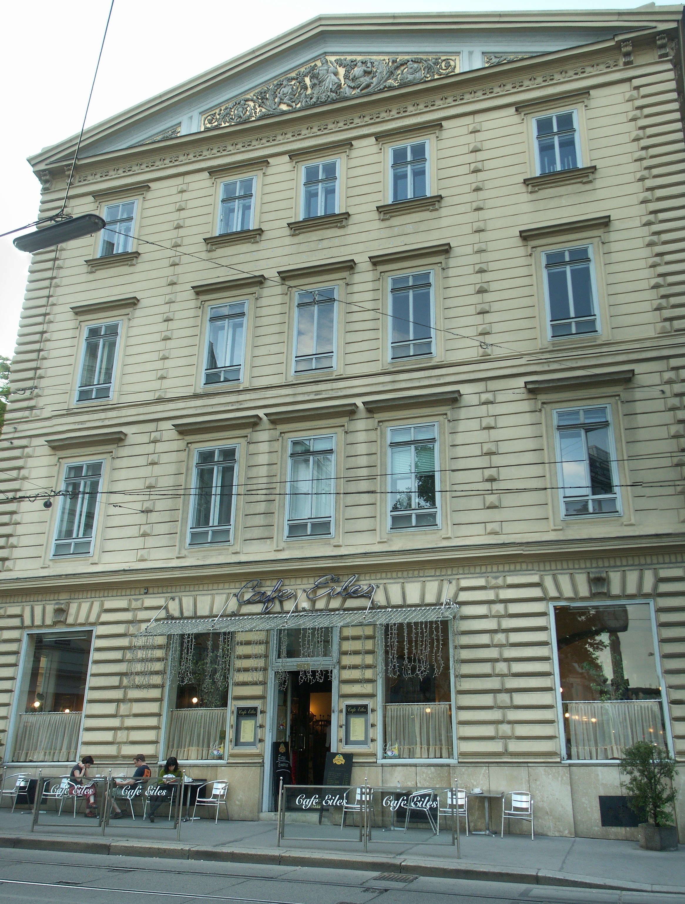 Café Eiles Josefstädter Straße 2, Wien (Panorama vertikal aus 3 Bildern)